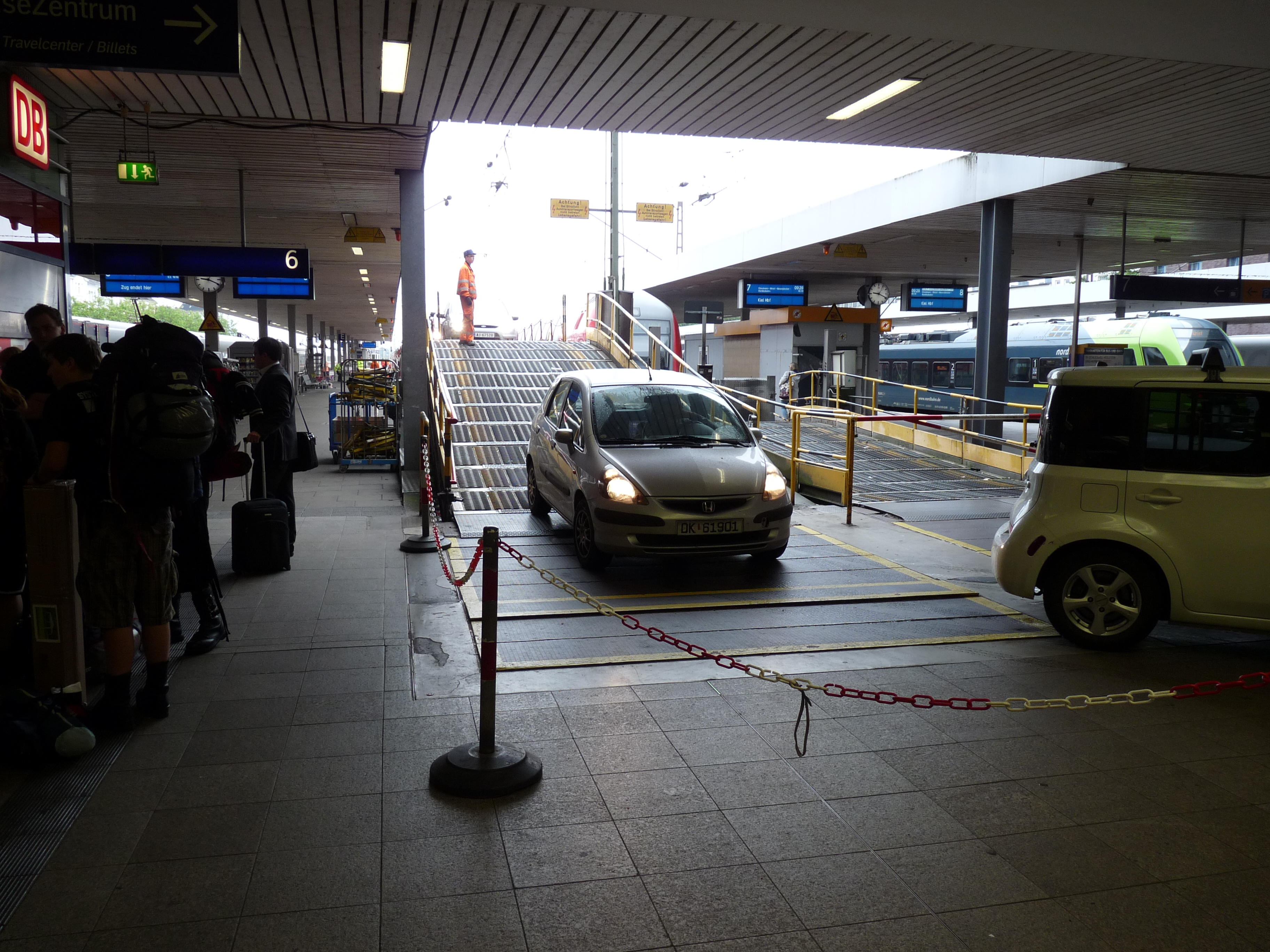 Het wegrijden van een autozug trein in het station van Hamburg Altona. Hiervoor wordt het rijpad door het station tijdelijk afgesloten met linten.